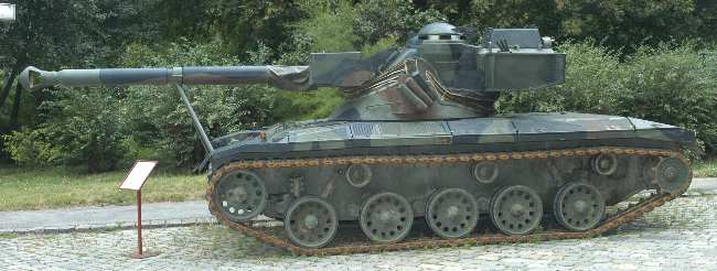 Jagdpanzer Kürassier vor dem Heeresgeschichtlichen Museum Wien